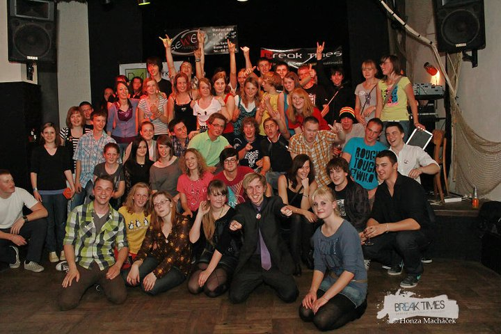 společná fotka BT